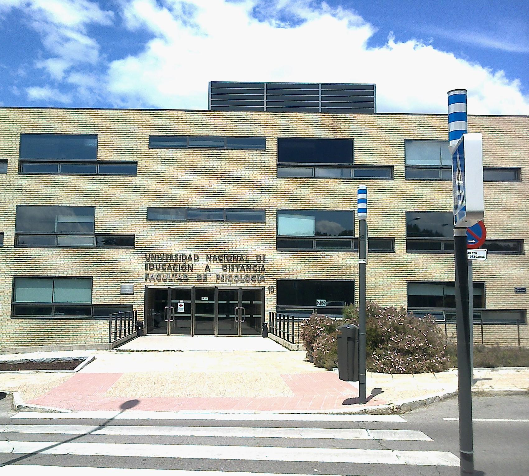 Facultad de Psicología de la UNED, Madrid, España, 2013.